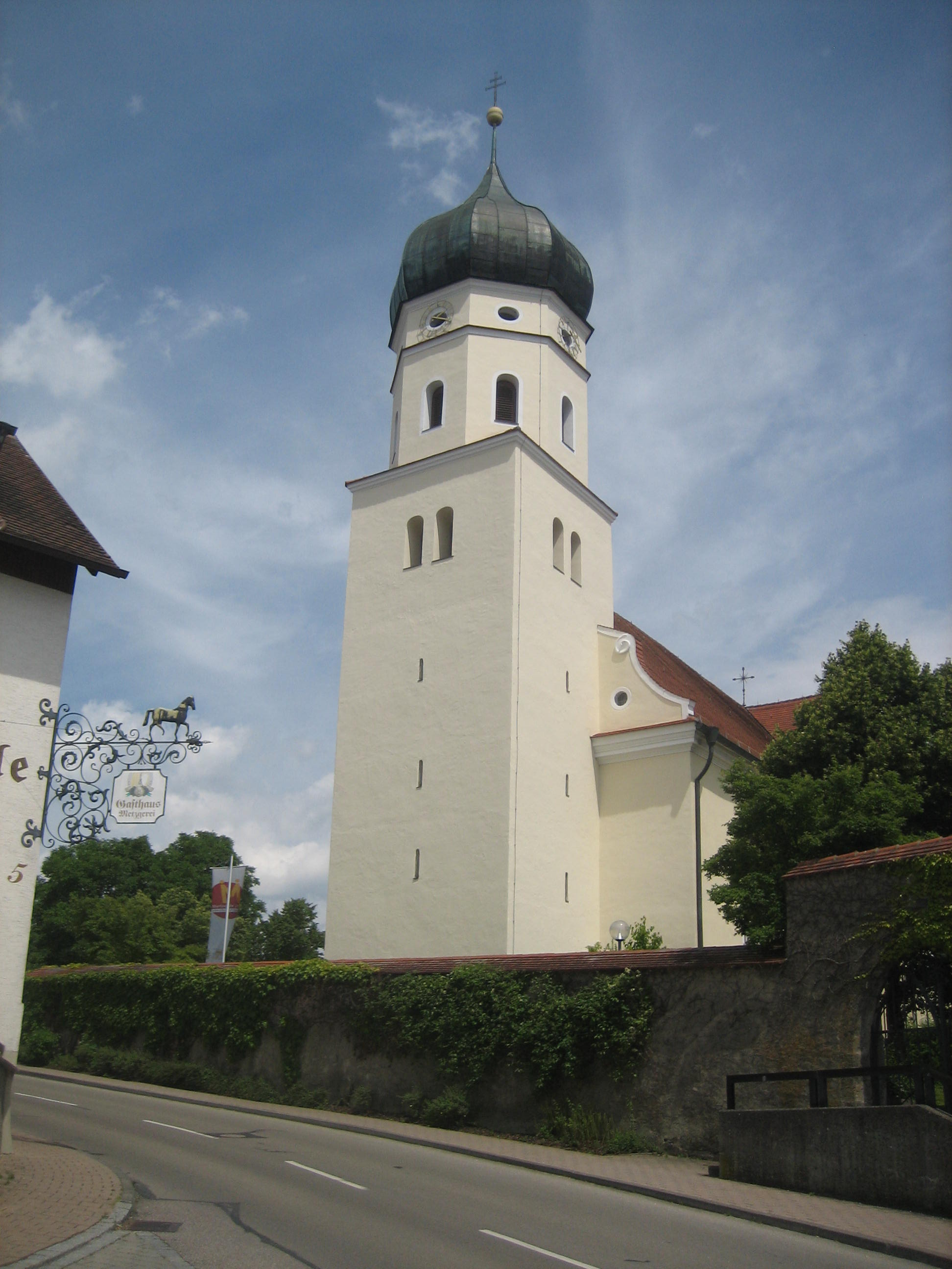 St.-Martins-Kirche Westerstetten